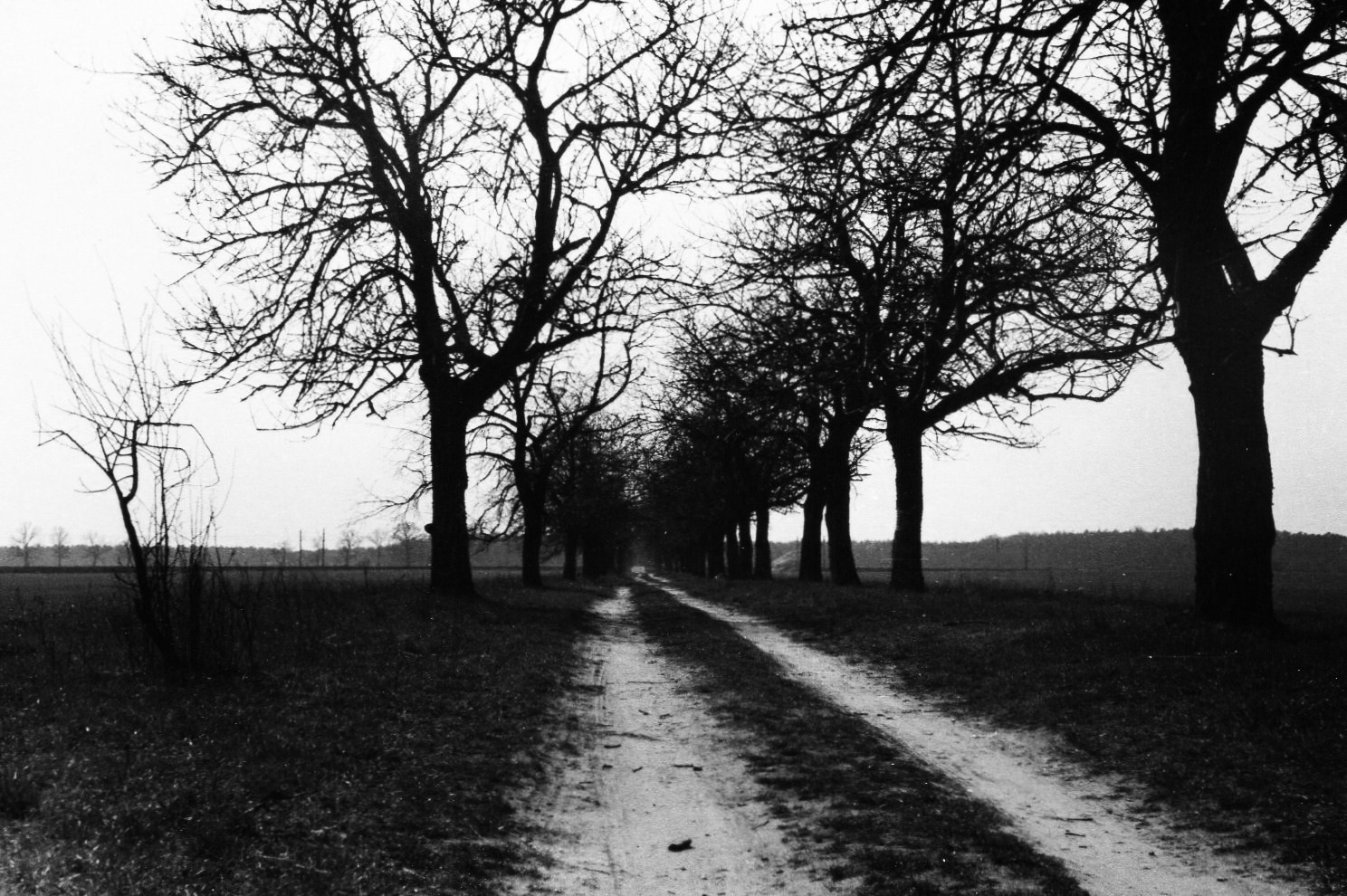 Poznań, ul. Wałecka. 14.4.1993r.